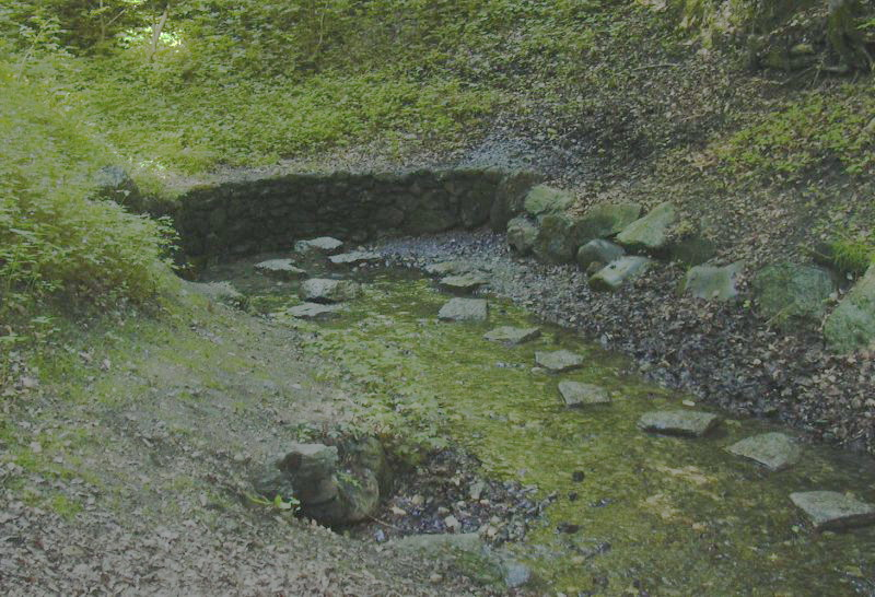 Die Schussenquelle bei Bad Schussenried Selbst fotografiert am 28.5.2005 GNU-FDL